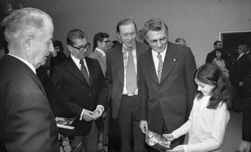 ADN-ZB-Spremberg 17.4.1975 Berlin: Vor der festlichen Kinopremiere des DDR Films "Jakob der Lügner" im Filmtheater "Kosmos" kam es zu einer herzlichen Begegnung zwischen dem Mitglied des Politbüros und Sekretär des ZK der SED Werner Lamberz (2.v.r.) und dem Regiesseur des Filmes Frank Beyer (Mitte) sowie den Darstellern Manuela Simon und Vlastimil Brodsky (2.v.l.)